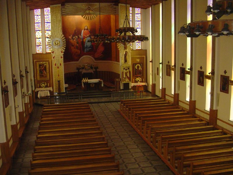 Parafia pw. św. Marcina w Piławie Górnej.